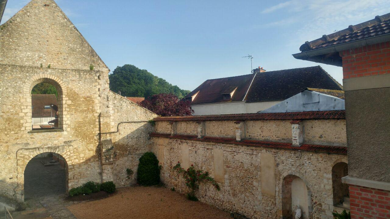 Cour intérieure du prieuré Saint-Thomas avec restes de vieux murs